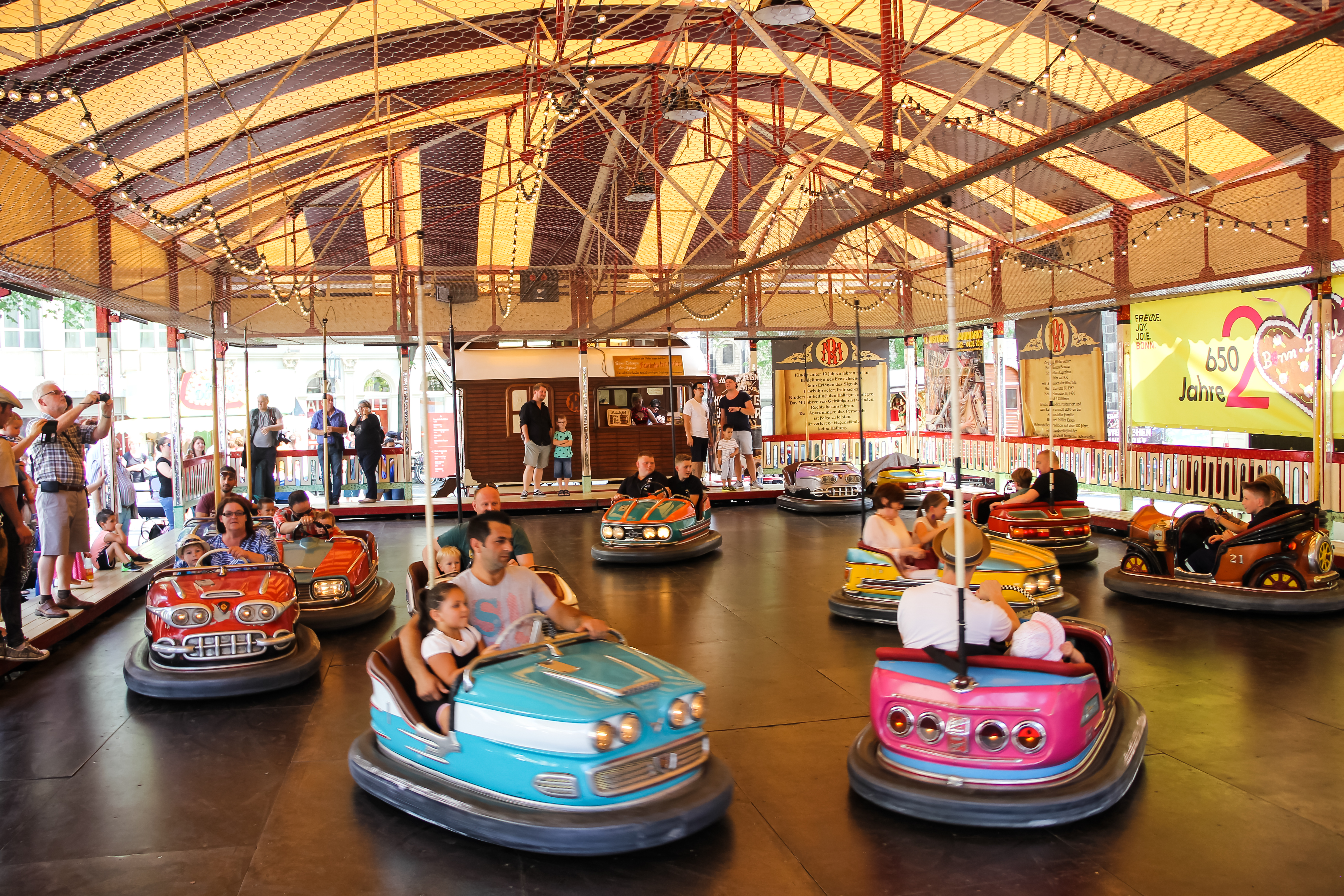 Historischer Jahrmarkt auf dem Münsterplatz. Der Jahrmarkt fand anlässlich der Feierlichkeiten "650 Jahre Pützchens Markt" statt. Einer der Höhepunkte war die Parade mit traditionellen historischen Fahrgeschäften und Zugmaschinen durch die Bonner Innenstadt am 9. Juli 2017.